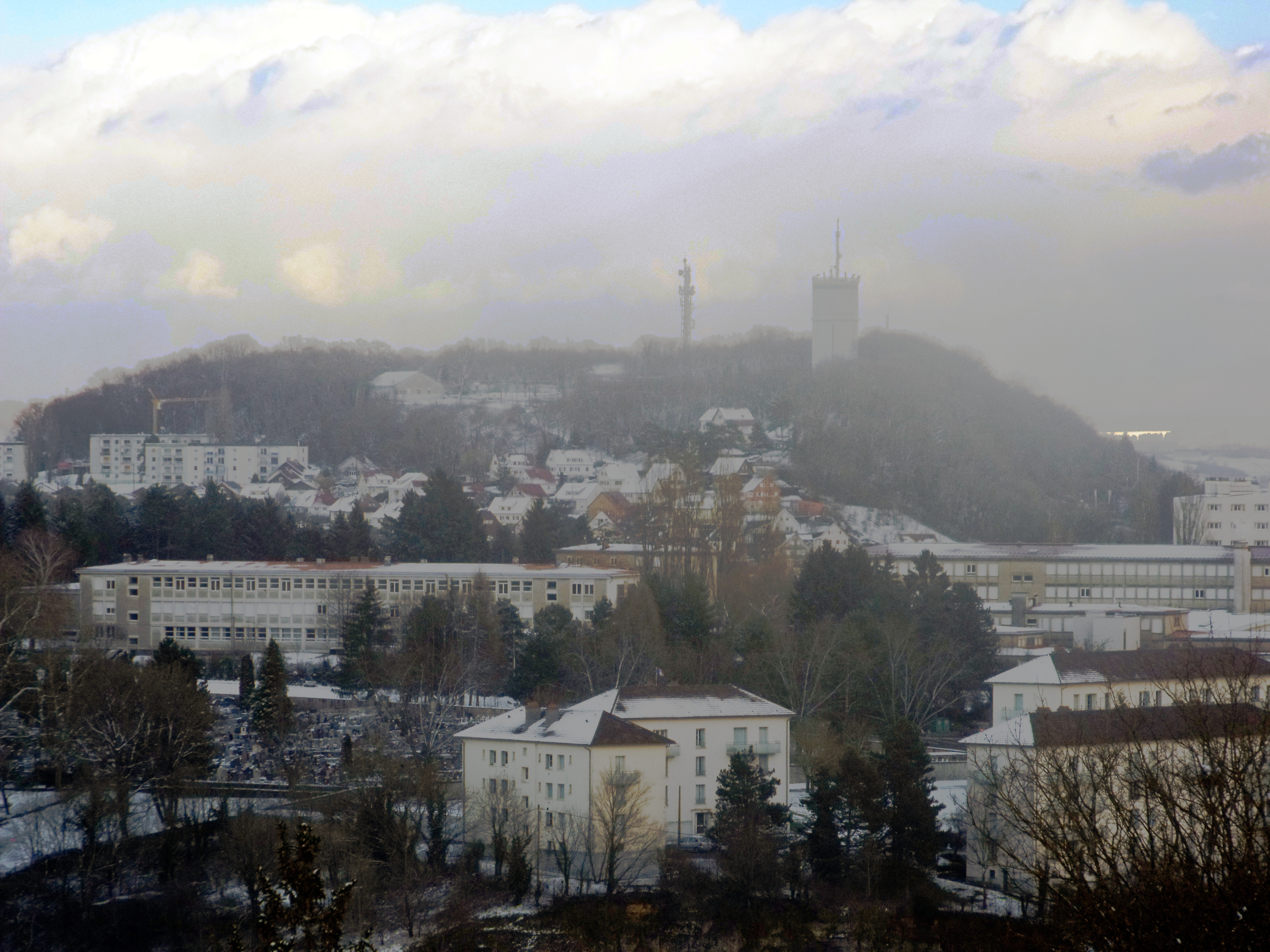 Colline sur laquelle se trouve le fort Lachaux